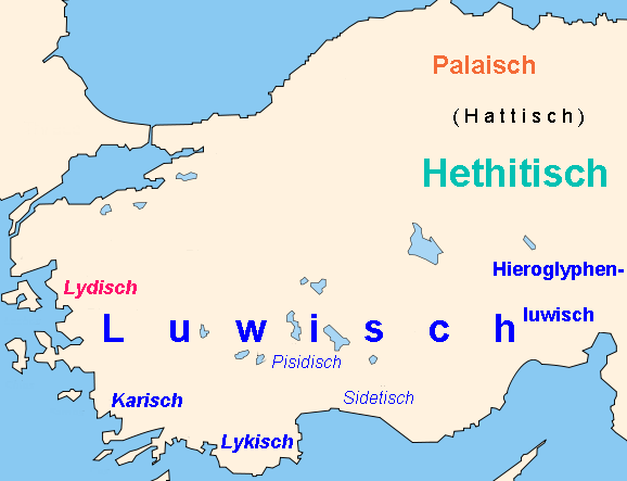 Verbreitung der Anatolischen Sprachen (Bornzezeit + Antike)